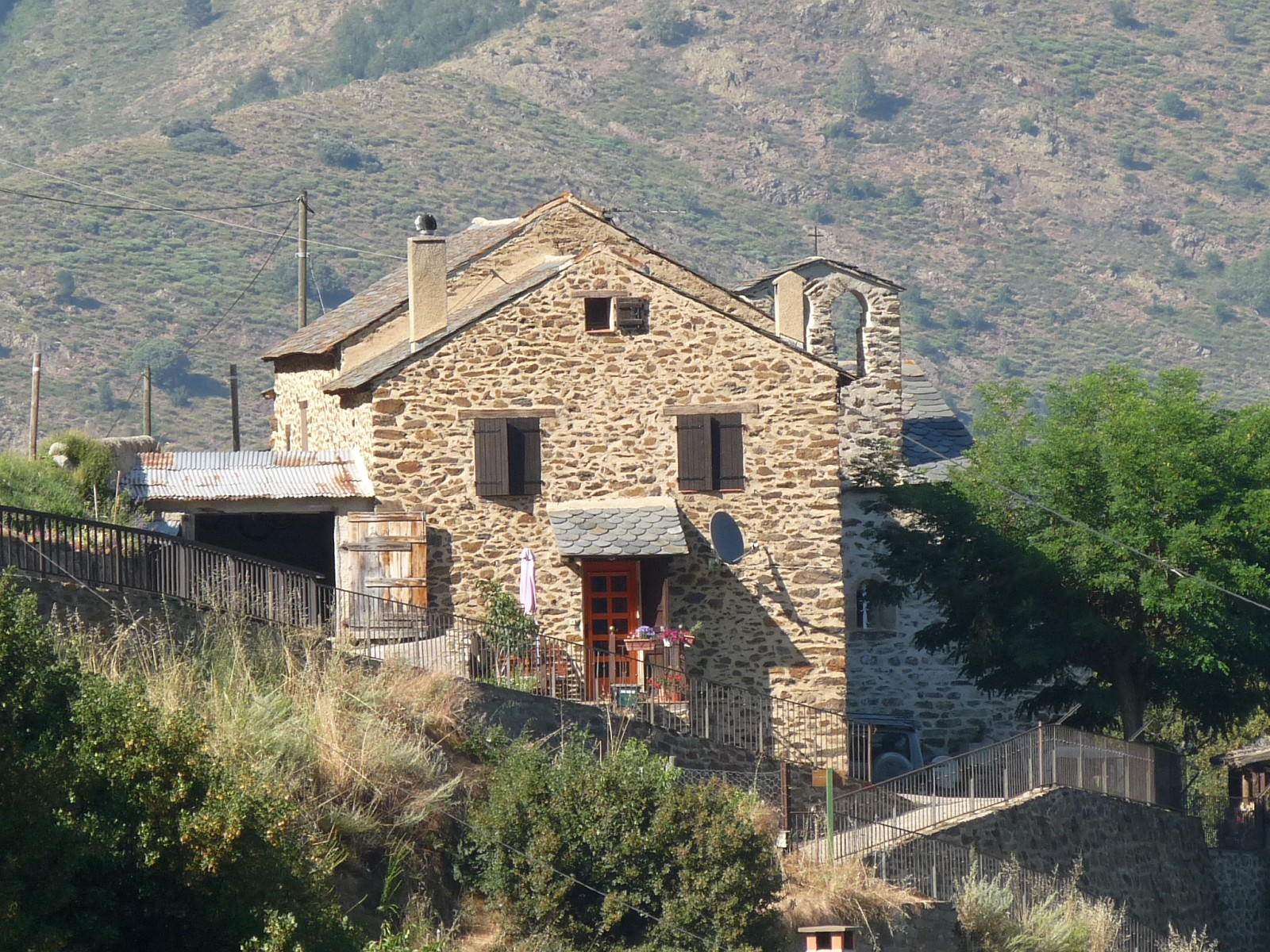 Eglise et ancien presbytère de Talau, Pyrénées-Orientales, France